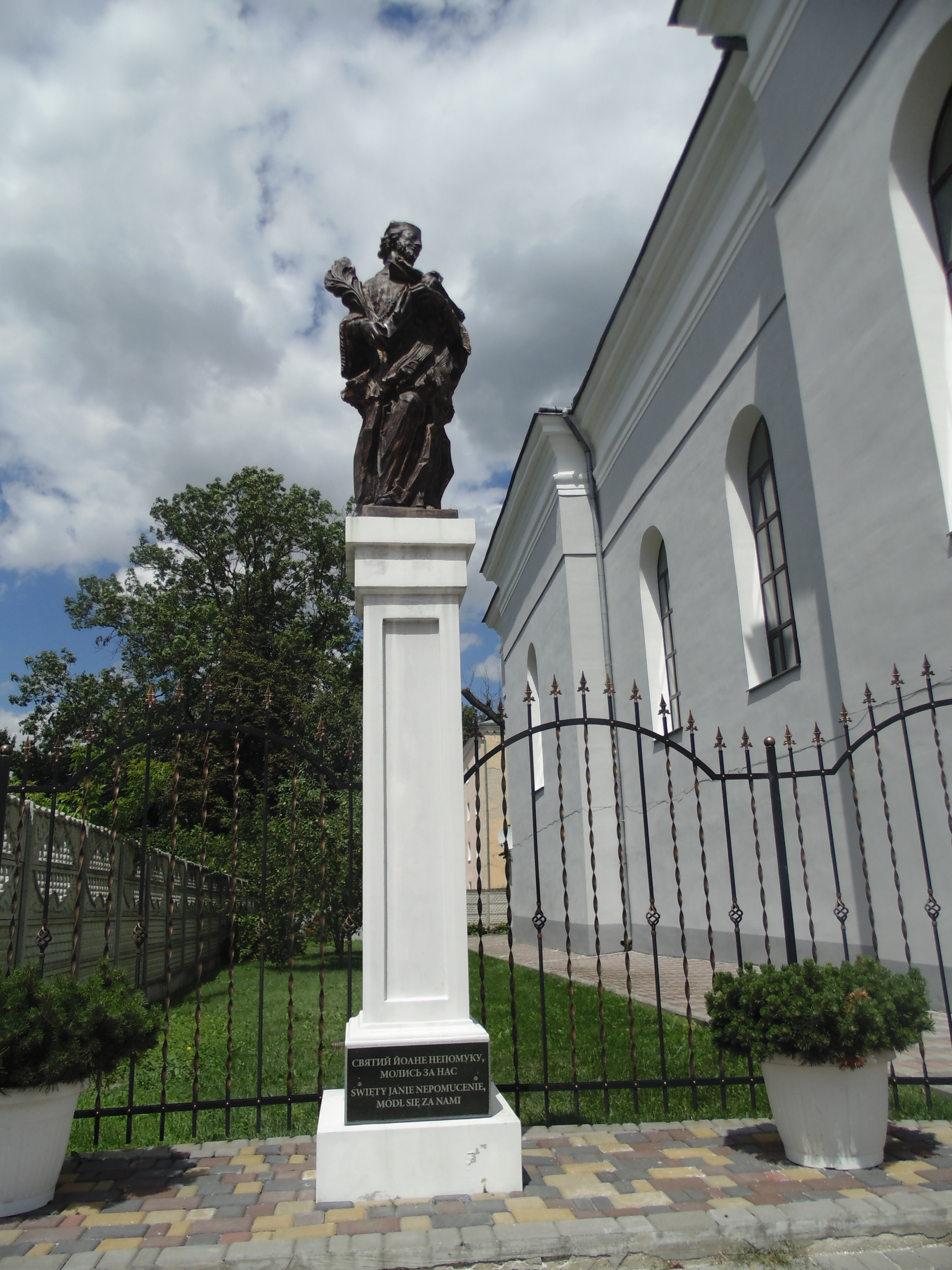 ...Під омофором Святого Яна Непомука в Дубні часів окупації були врятовані єврейські діти. посвідки про їхнє хрещення видавав тодішній настоятель храму Станіслав Кузьмінський